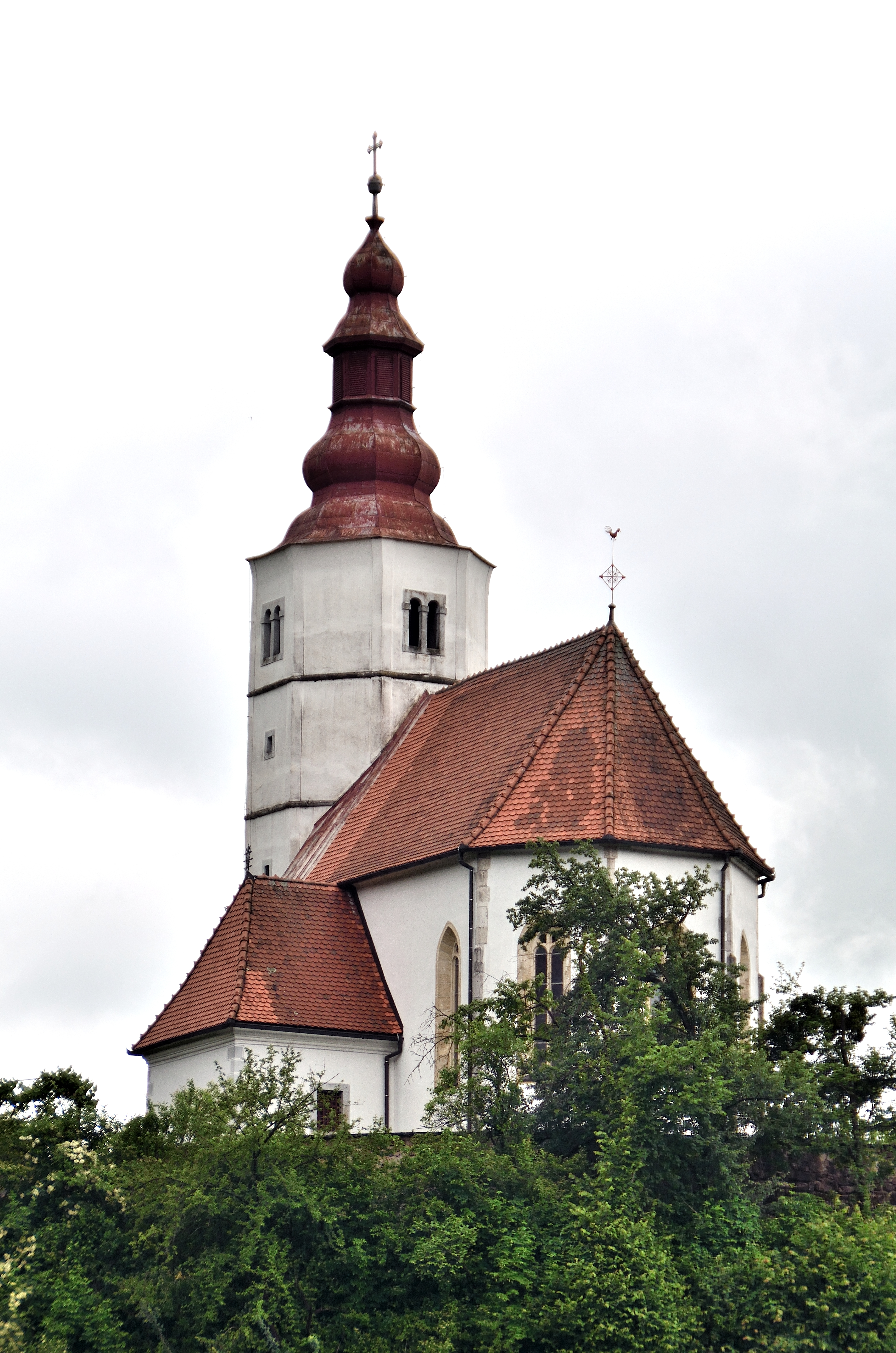 Cerkev Sv.Marije Laško